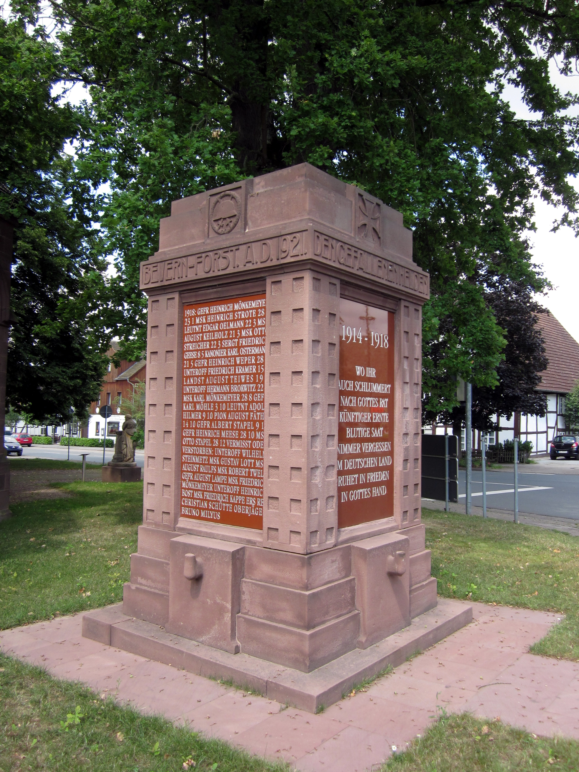 Kriegerdenkmal in Bevern (Landkreis Holzminden)